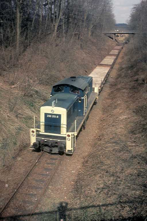 Bahnhof Wassenberg 25.3.1985 * Quelle: Sammlung B.Dohmen, Archiv-Nr. 71/27 * Fotograf: Benedikt Dohmen, User:Benedictus * Copyright Status: GNU Freie Dokumentationslizenz